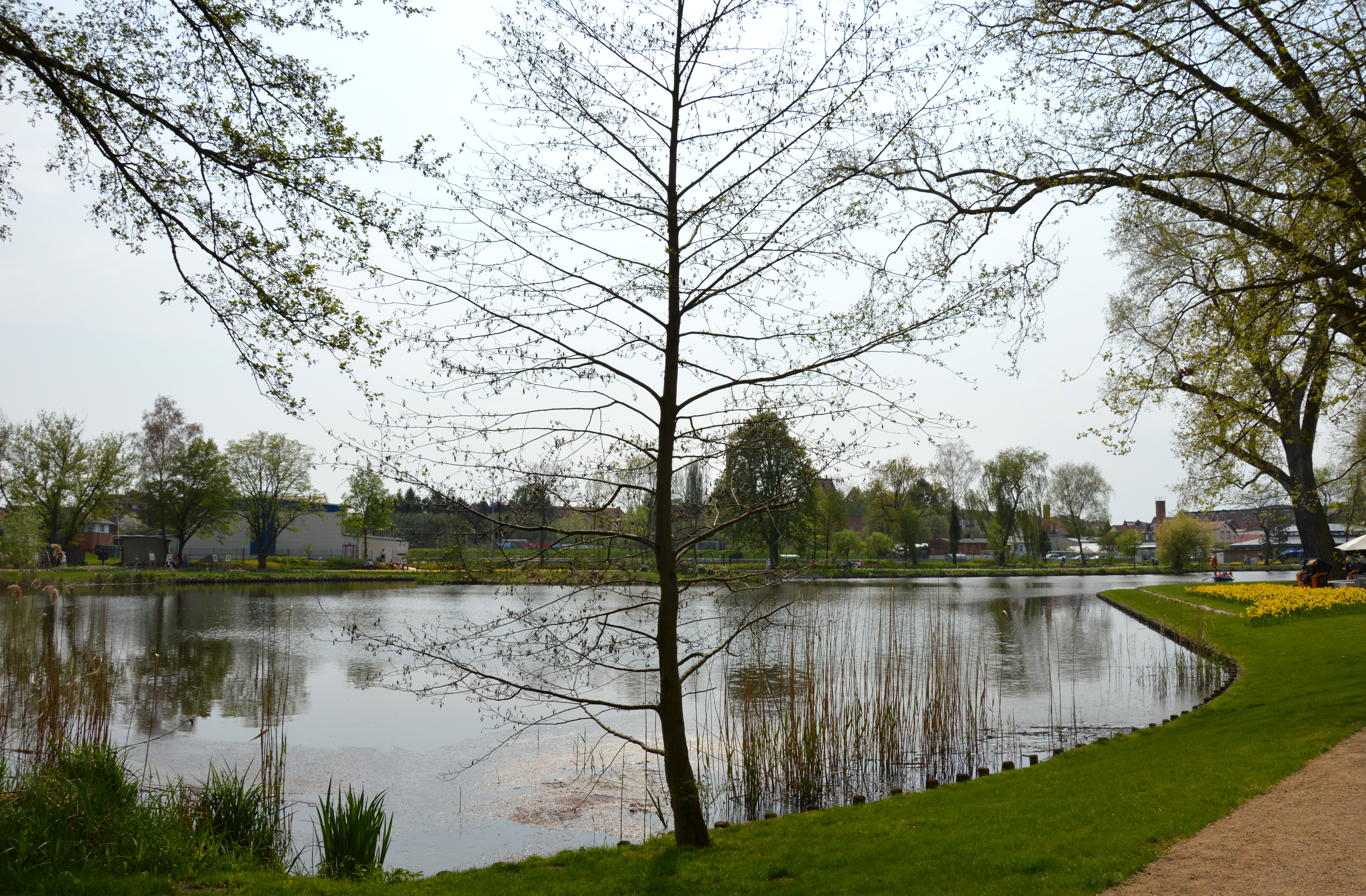 Teich im Flickschuhpark Burg